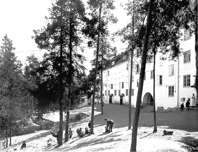 AGA:s personalbostäder i bostadsområdet Bergsätra på Lidingö uppfört 1914. Portalen mitt i huslängan med trappa mellan syd och nordsida av huset syns mitt i bild.